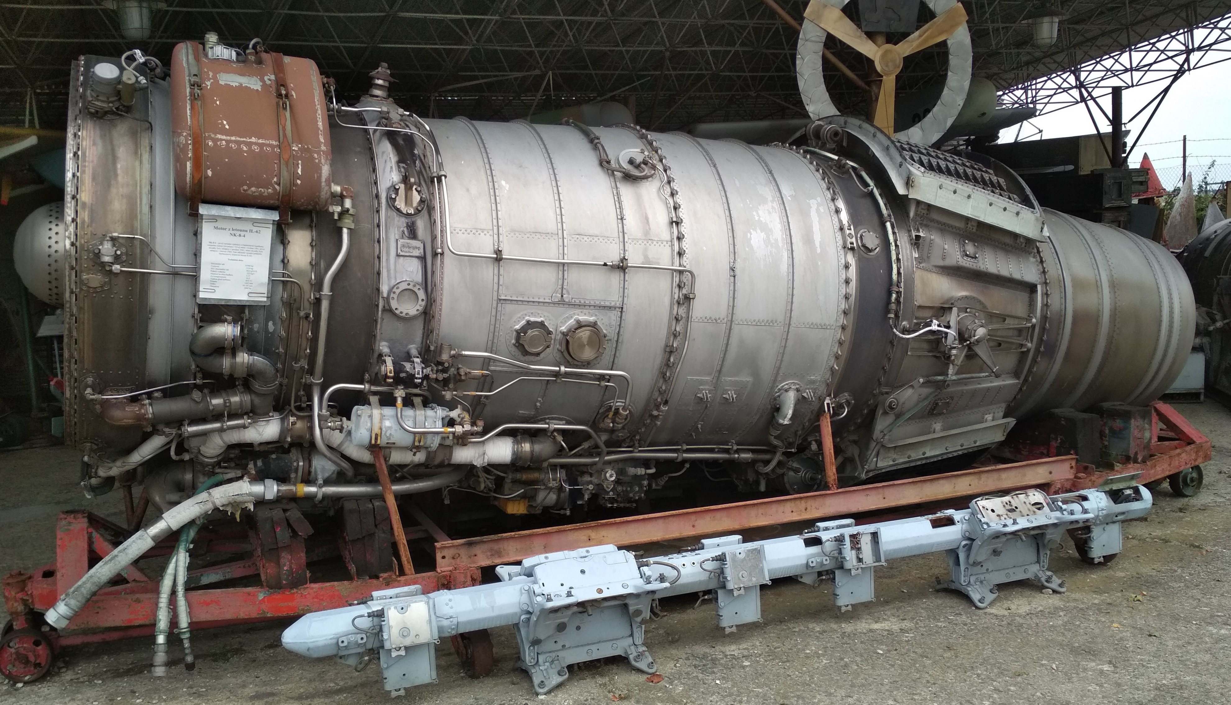 Silnik odrzutowy IL-62